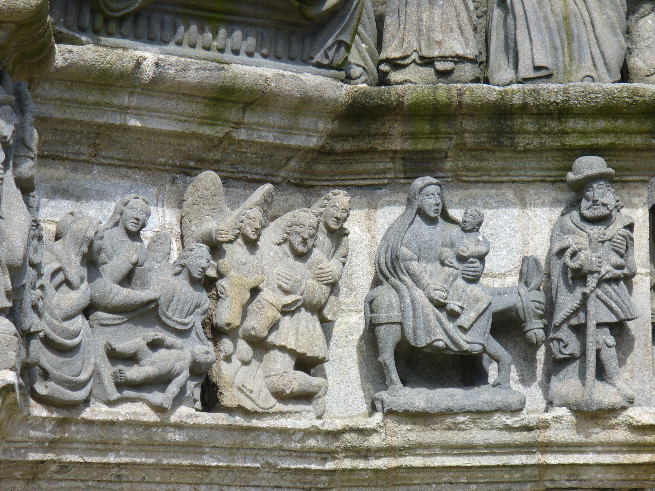 Links-Maria über das Jesuskind Gebeugt,umgeben von Joseph und zwei Engeln-Daneben Hirte mit Engel. Rechts-Relief-Flucht nach Ägypten.Maria das Jesus Kind in ihren Armen haltend auf dem Esel sitzend.Daneben Joseph - Enclos Paroissal-Umfriedeter Pfarrbezirk von Guimiliau